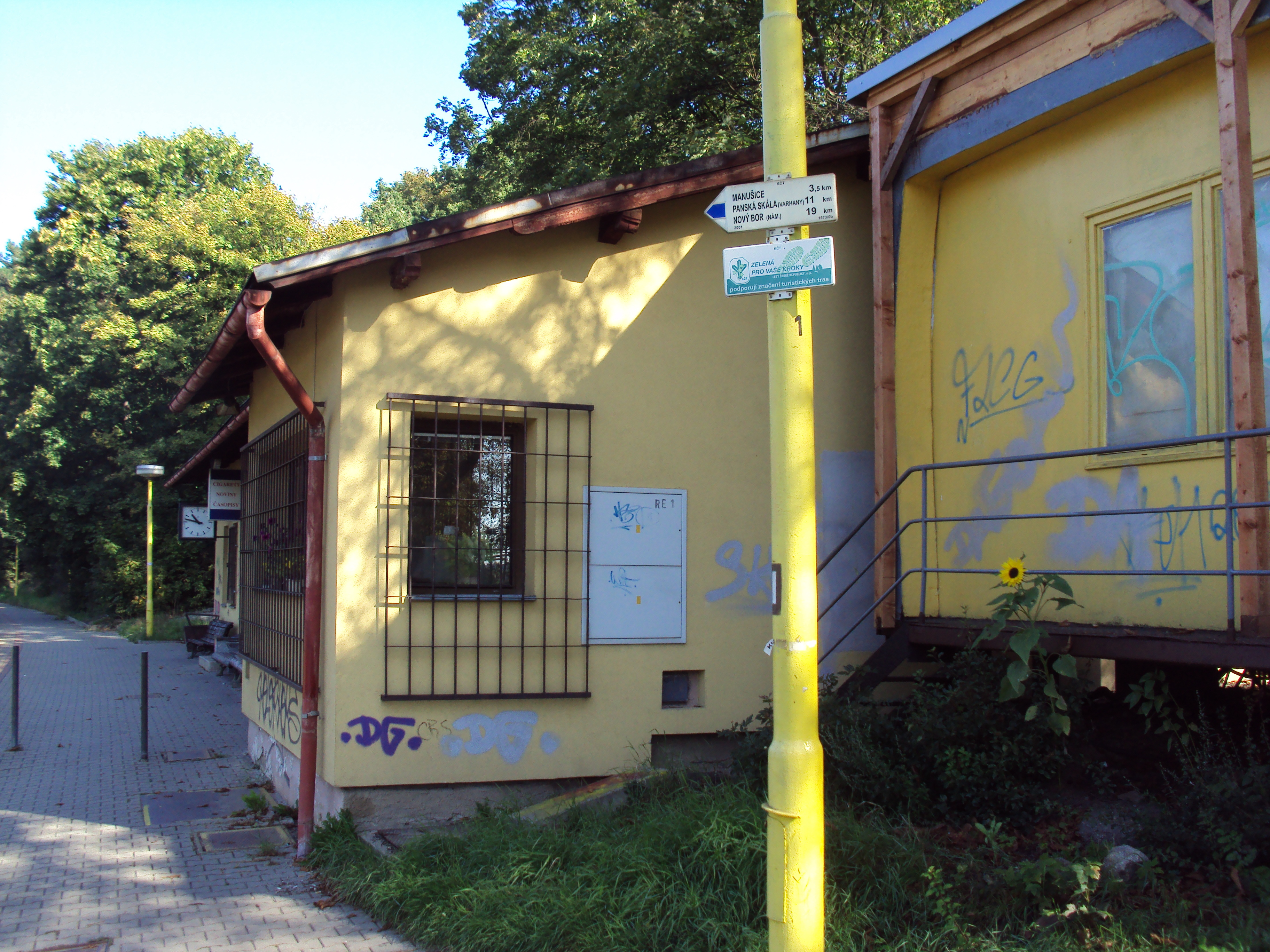 Modrá turistická trasa 1673 začíná v České Lípe, u žel.zastávky Střelnice